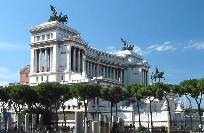 Rom: Monument Vittorio Emmanuele II.